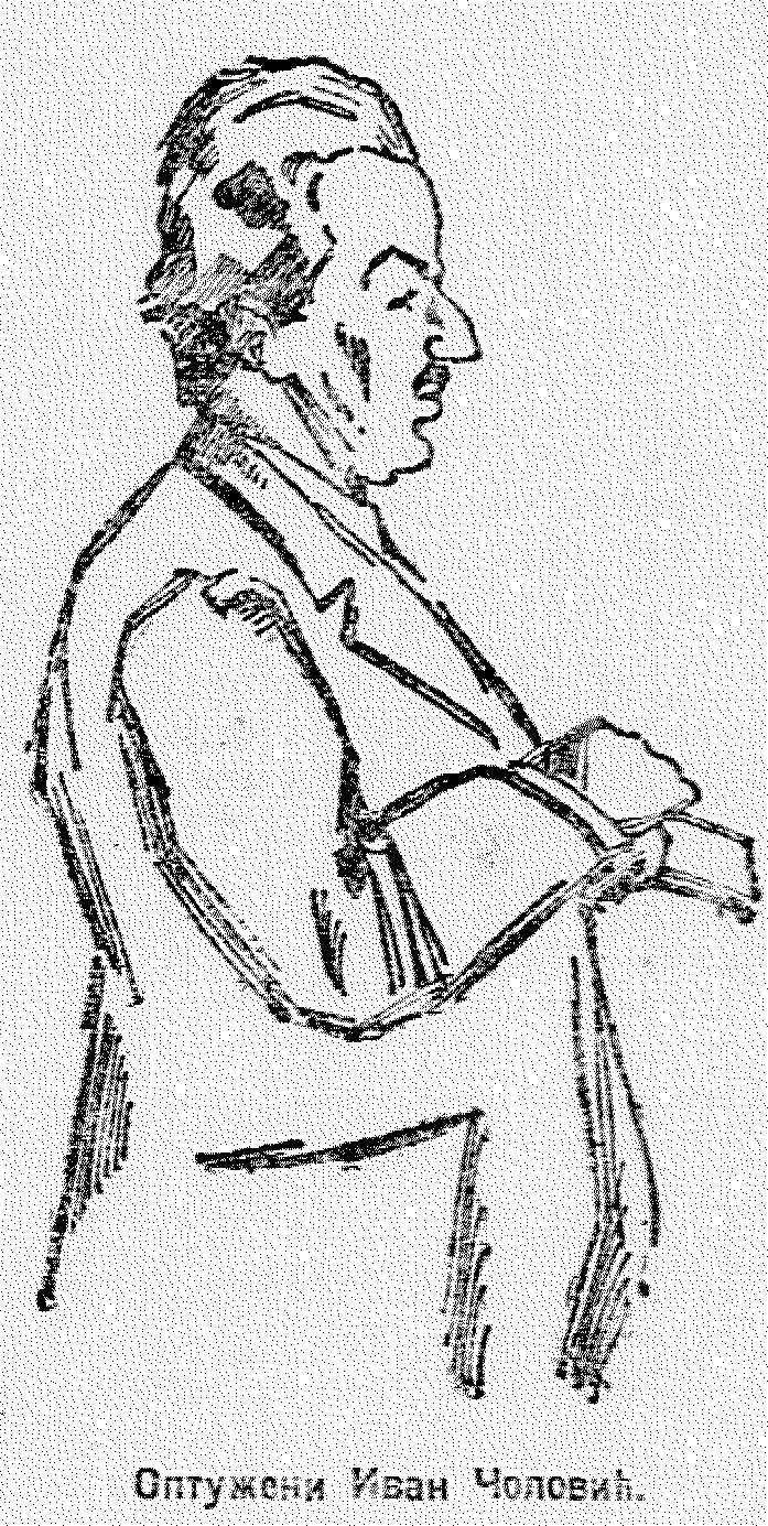 Srpskohrvatski / српскохрватски: Ivan Čolović, član Centralnog Komiteta Komunističke partije Jugoslavije, optužen na Vidovdanskom procesu. Ilustracija iz Politike.